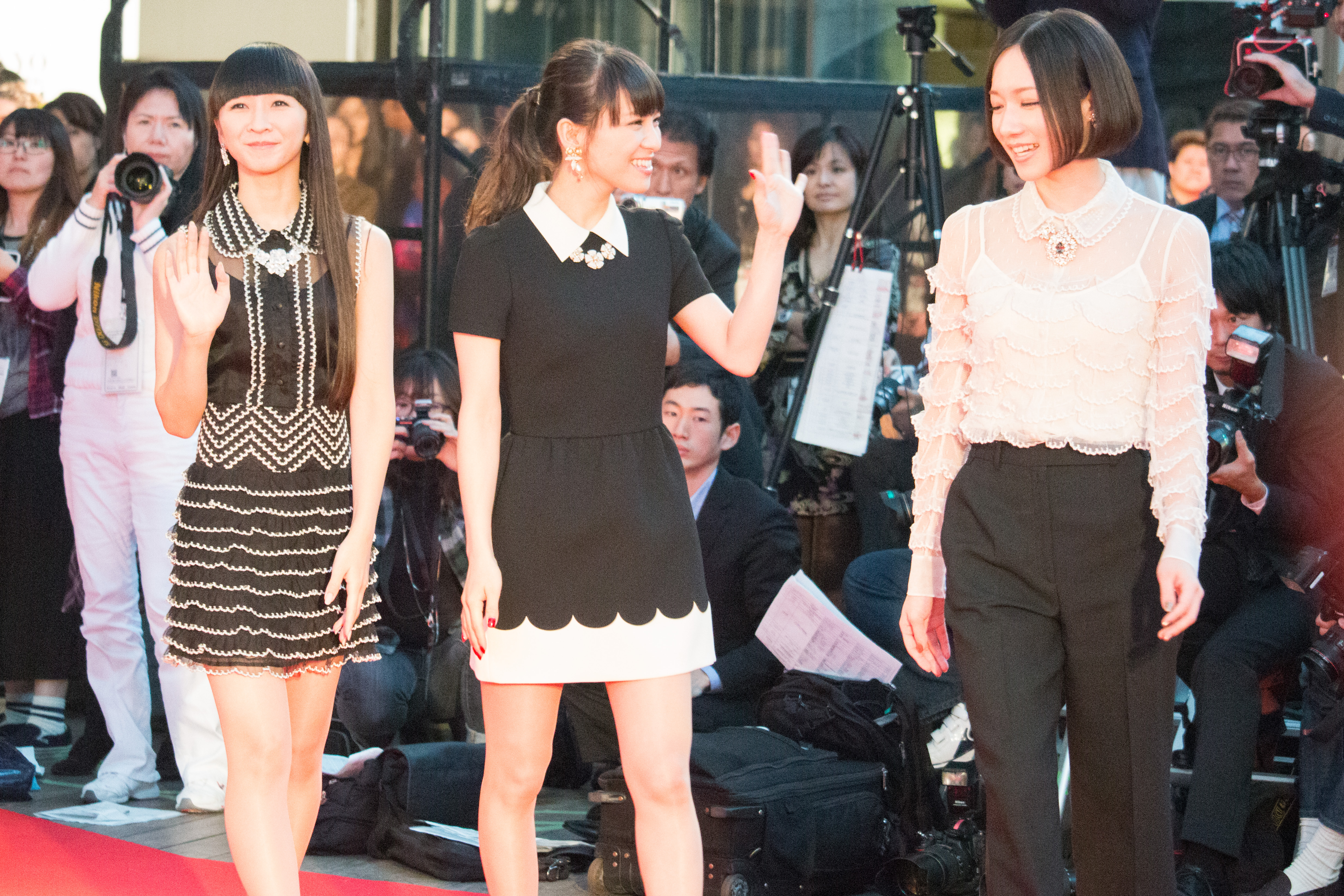 第28回 東京国際映画祭 オープニングセレモニー あ～ちゃん のっち かしゆか (Perfume) (We Are Perfume)